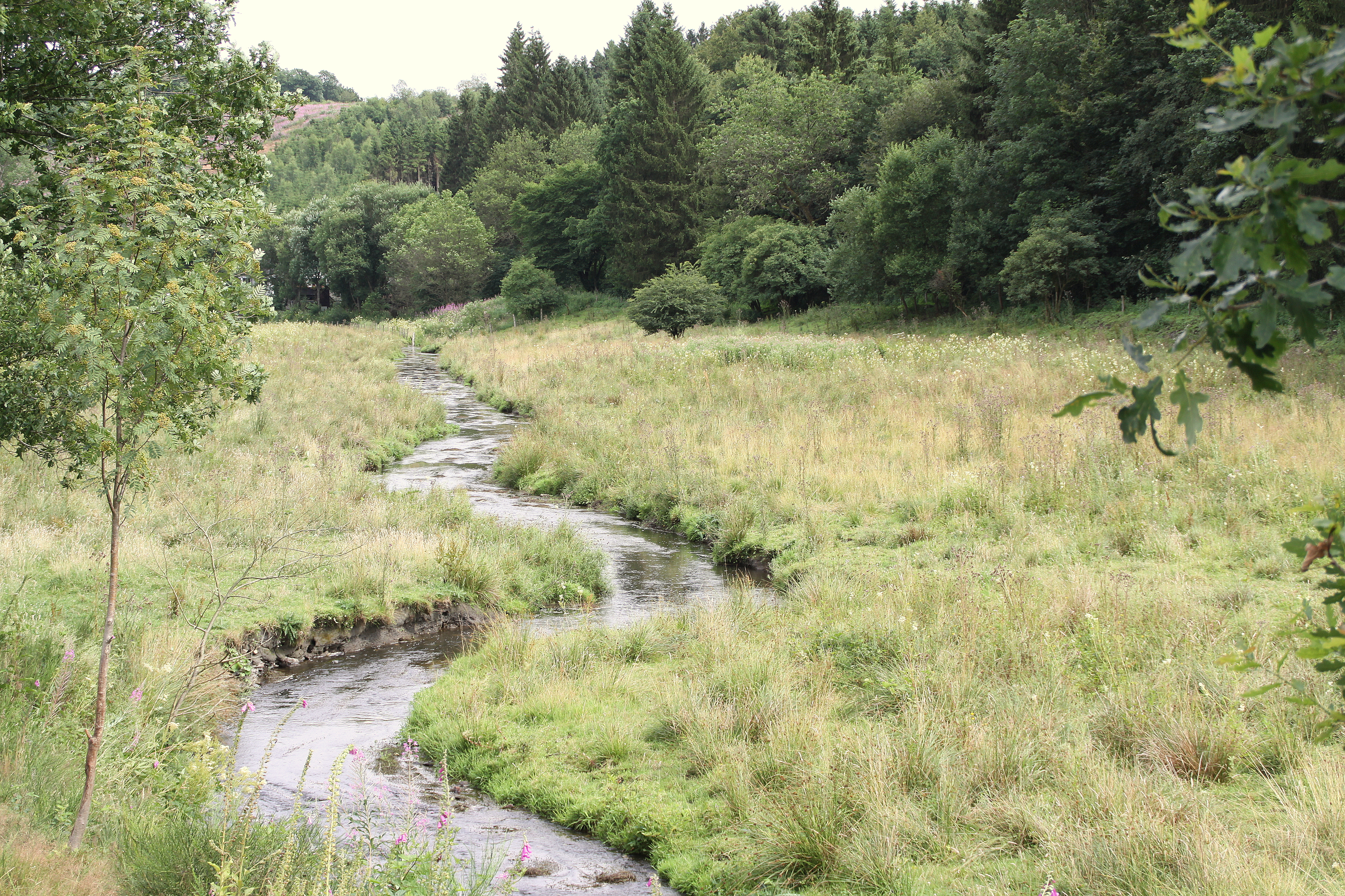 D'Trëtterbaach am Summer 2013